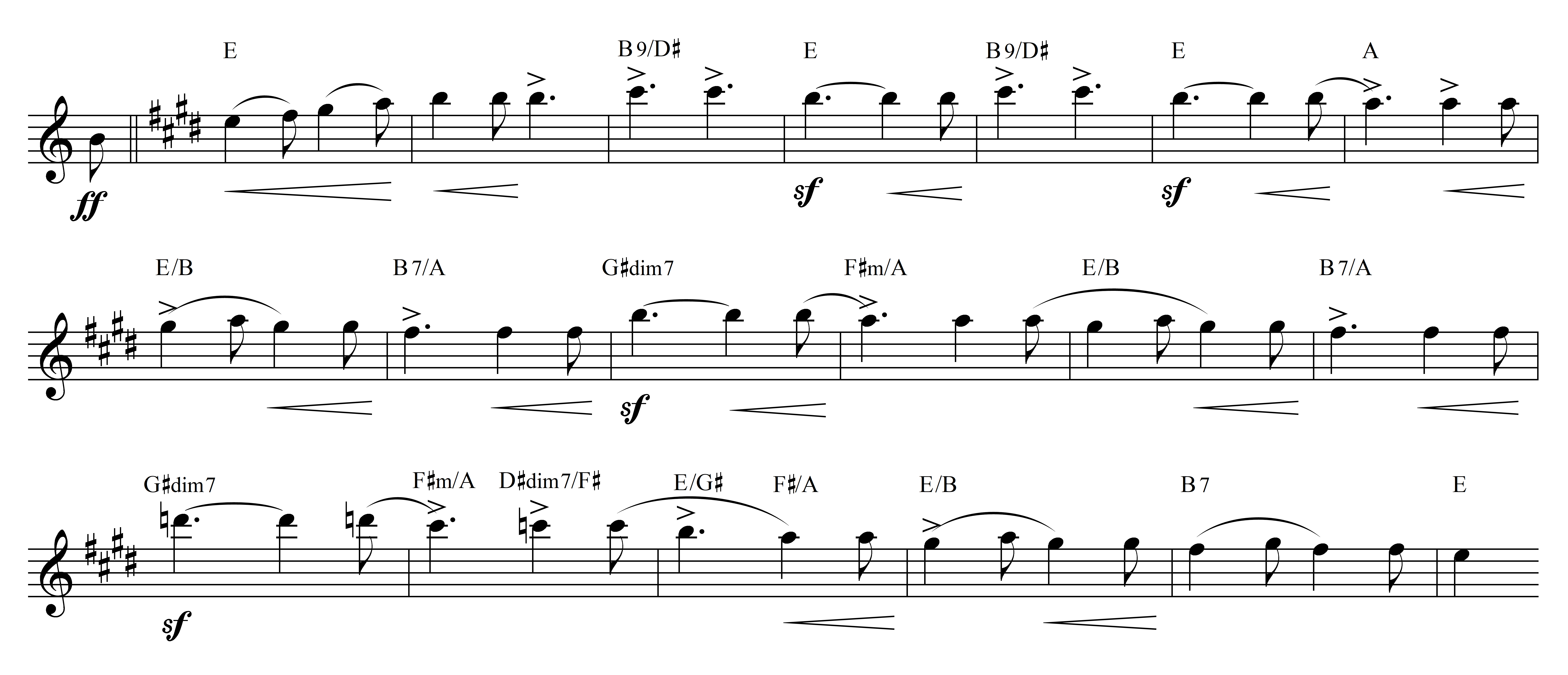 Notenbeispiel Smetana Die Moldau strömt breit dahin harmonisiert T. 333-351